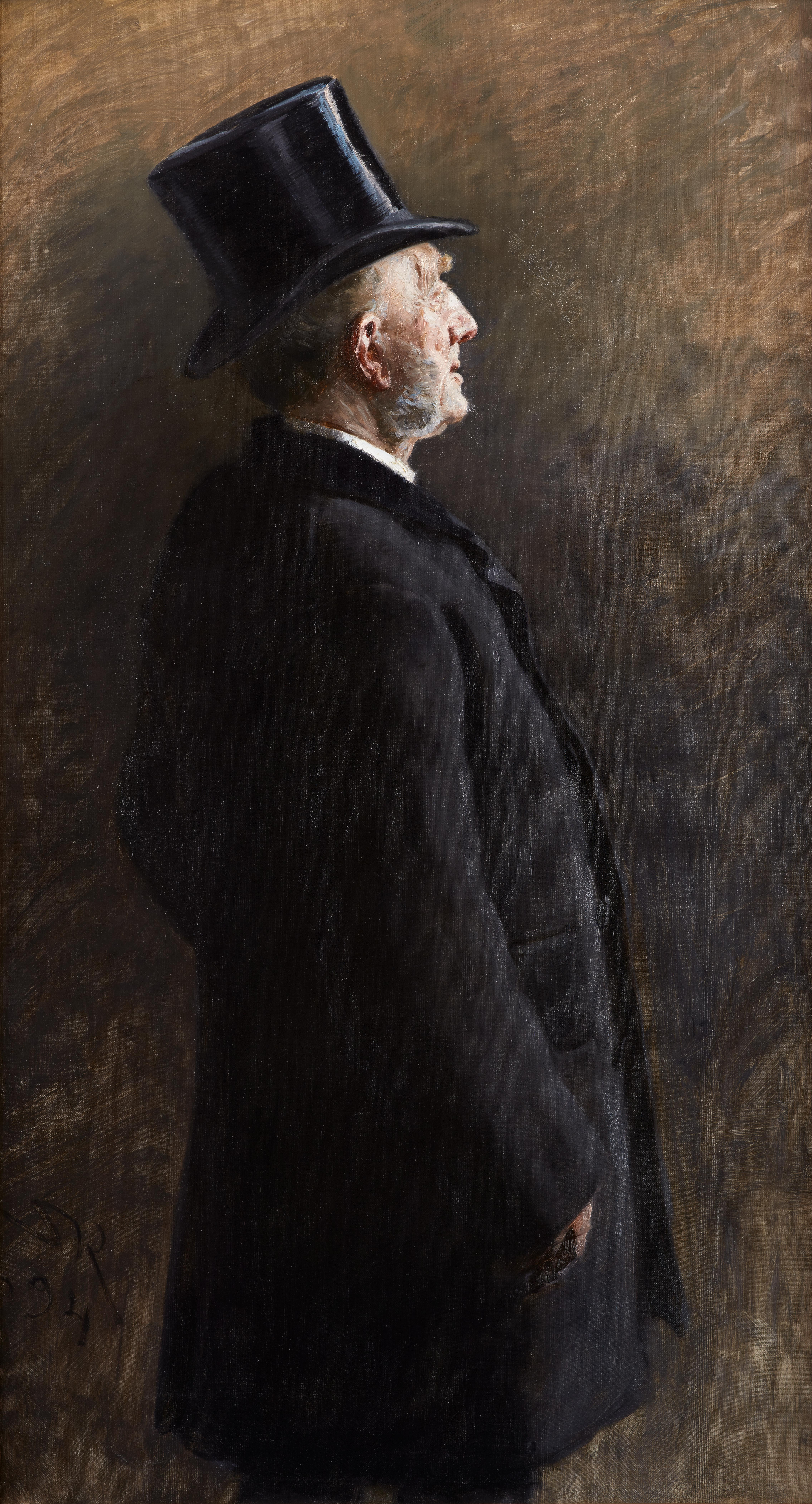 Study for Krøyer's "From Copenhagen Stock Exhange".